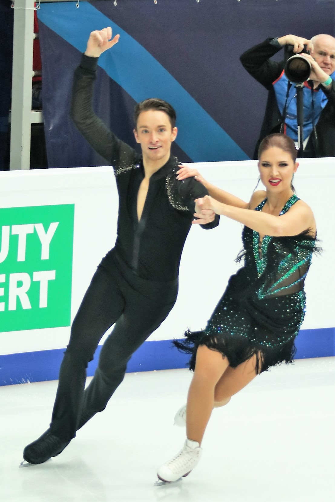 Сесилия Тёрн / Юссивилле Партанен (Финляндия) на Чемпионате Европы по фигурному катанию 2018.